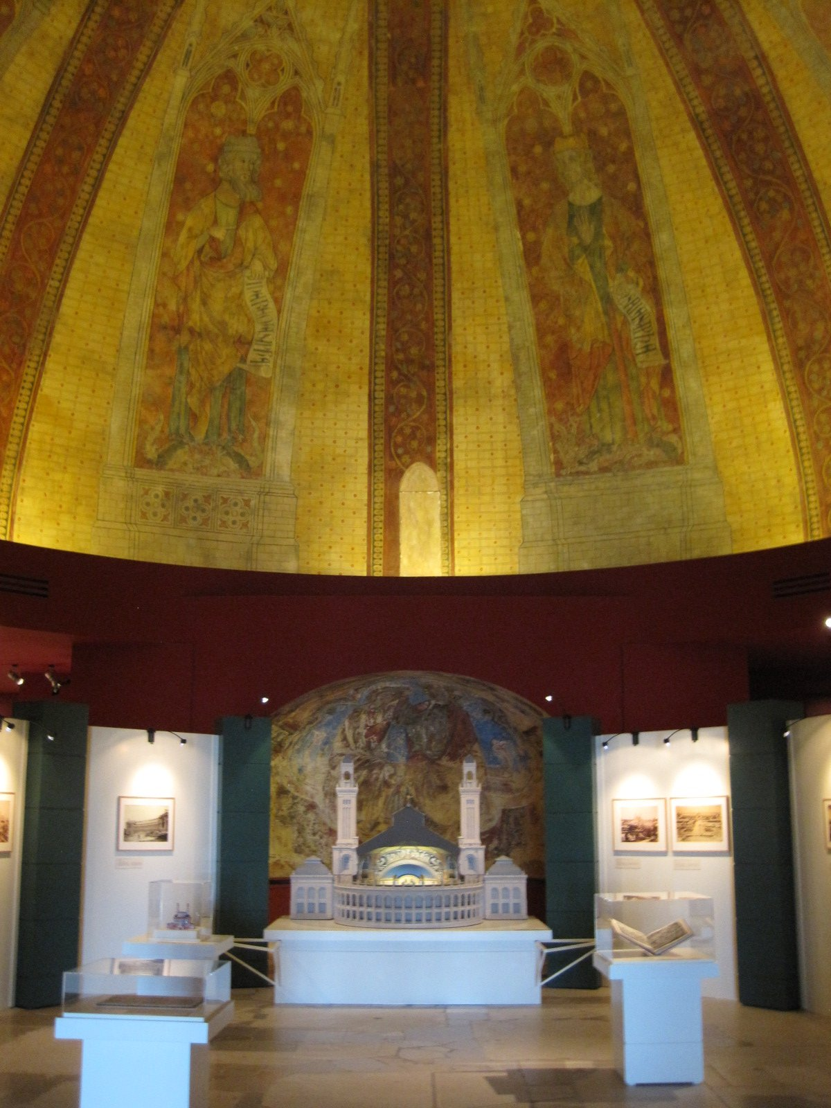 Cité de l'Architecture et du Patrimoine